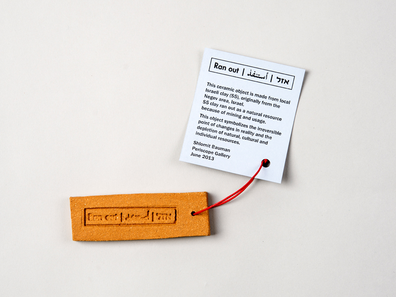 מתוך הפרויקט אזל. חומר קרמי מקומי. מזכרת ממשאב טבע שאזל